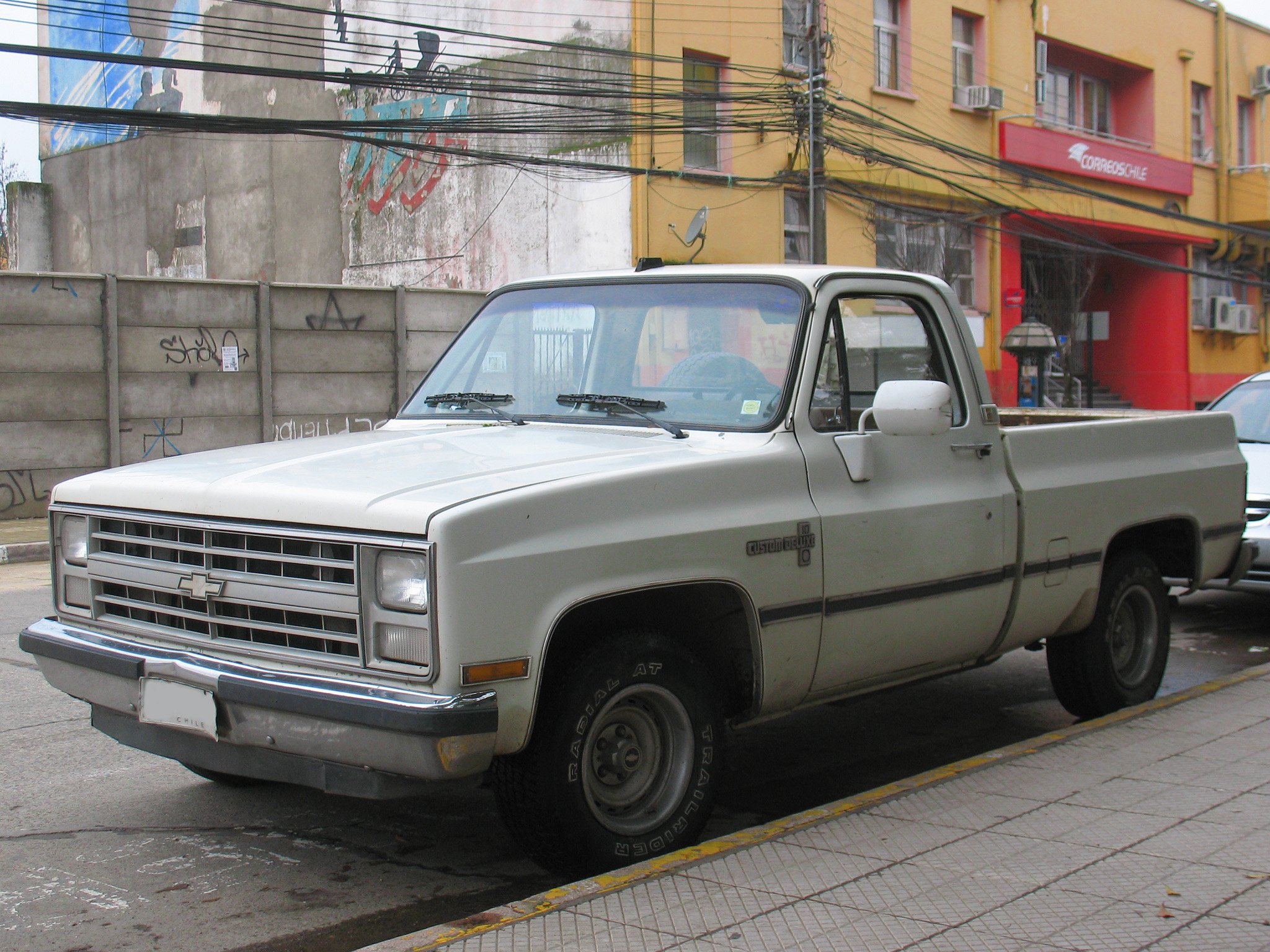 Chevrolet C-10 Custom Deluxe 1988